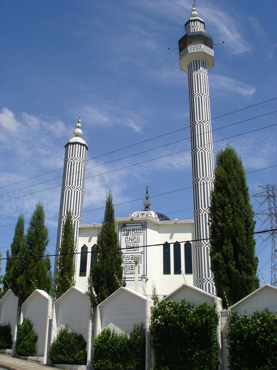 Imagem da cidade de Mogi das Cruzes.